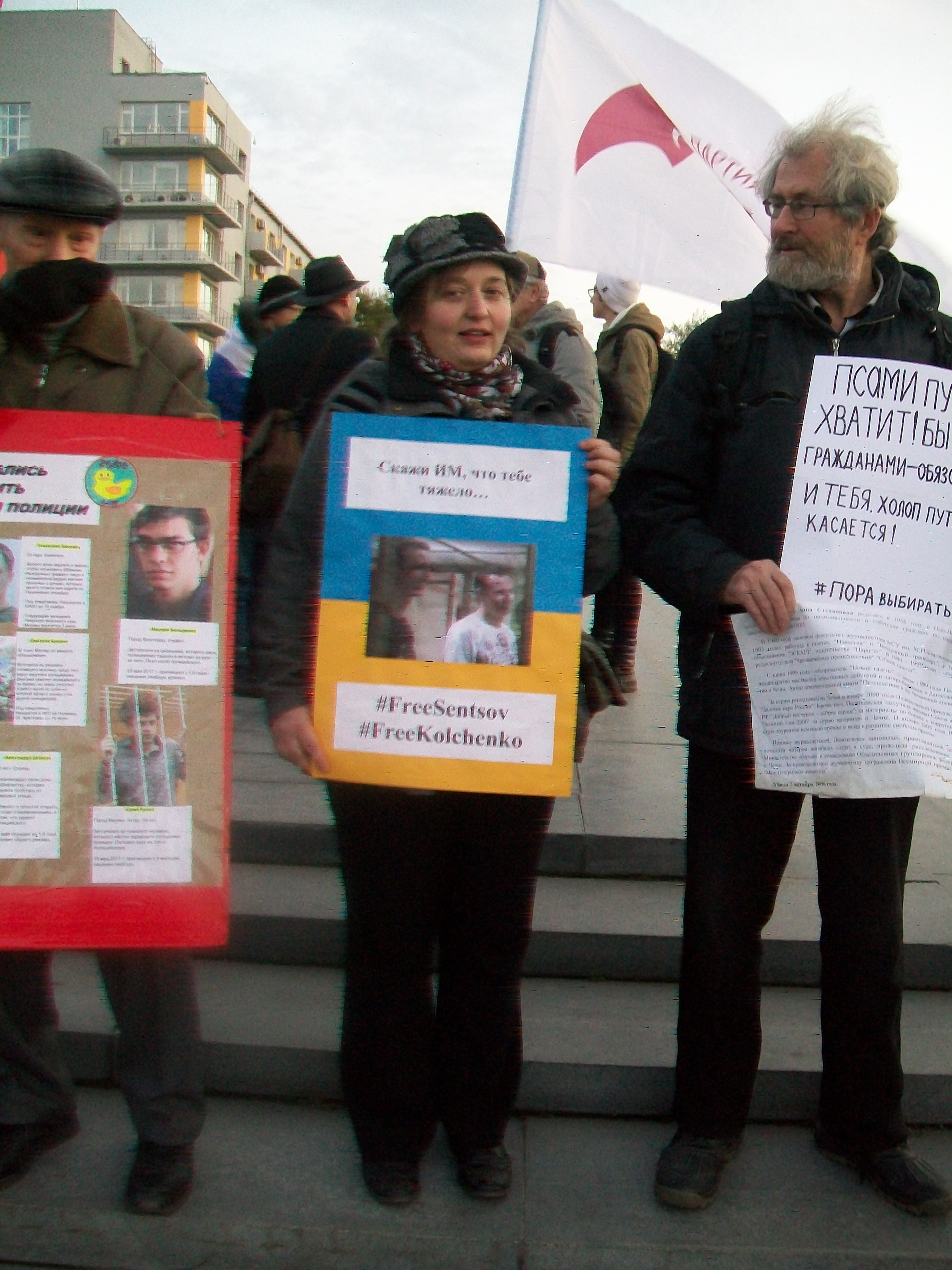 Феминистка Яна Лысакова на пикете в защиту политзаключенных. Екатеринбург, 6 октября 2017 года